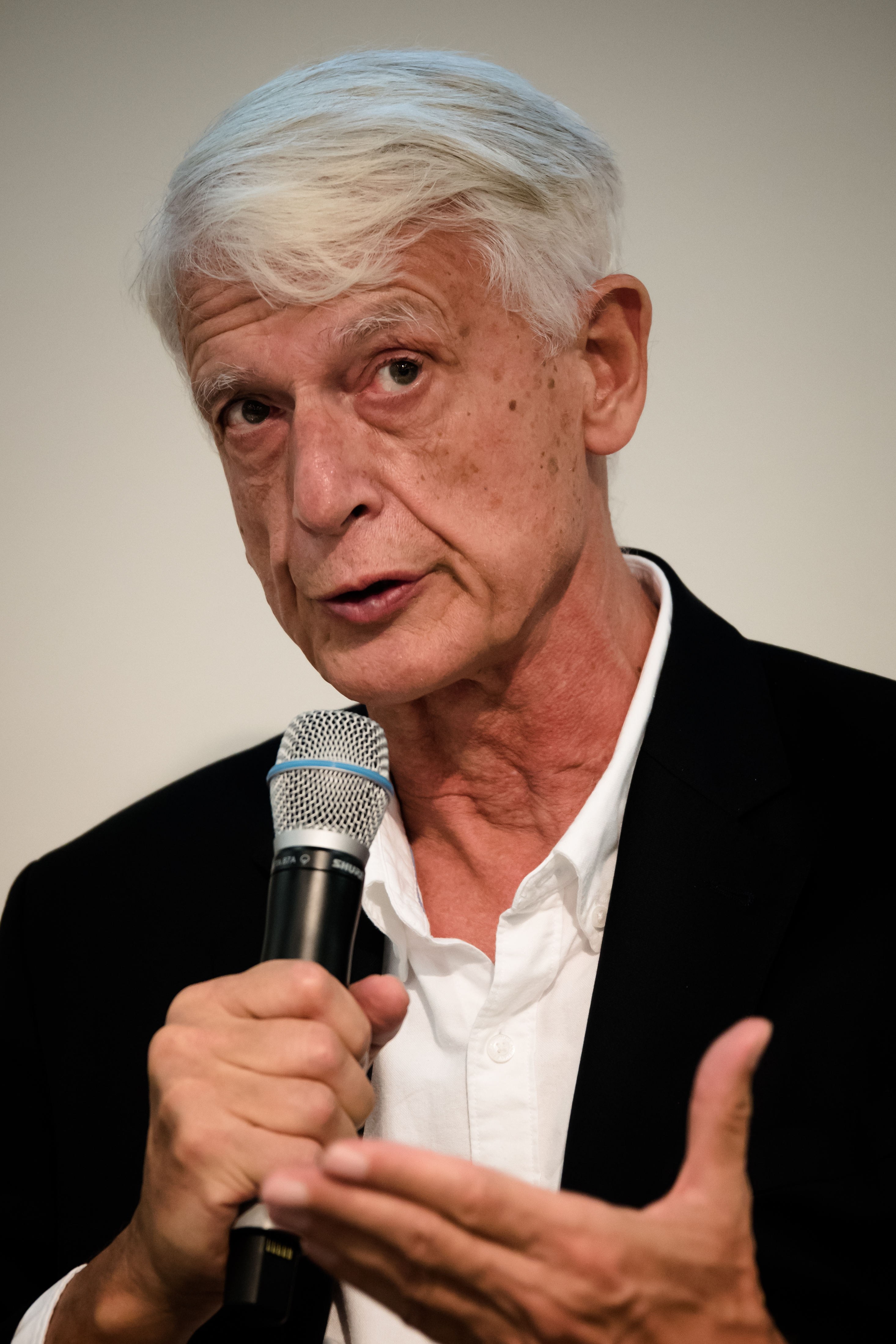 Der Journalist und Schriftsteller Werner Sonne auf der Frankfurter Buchmesse 2017